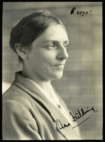 Portrait Una Lucy Fielding